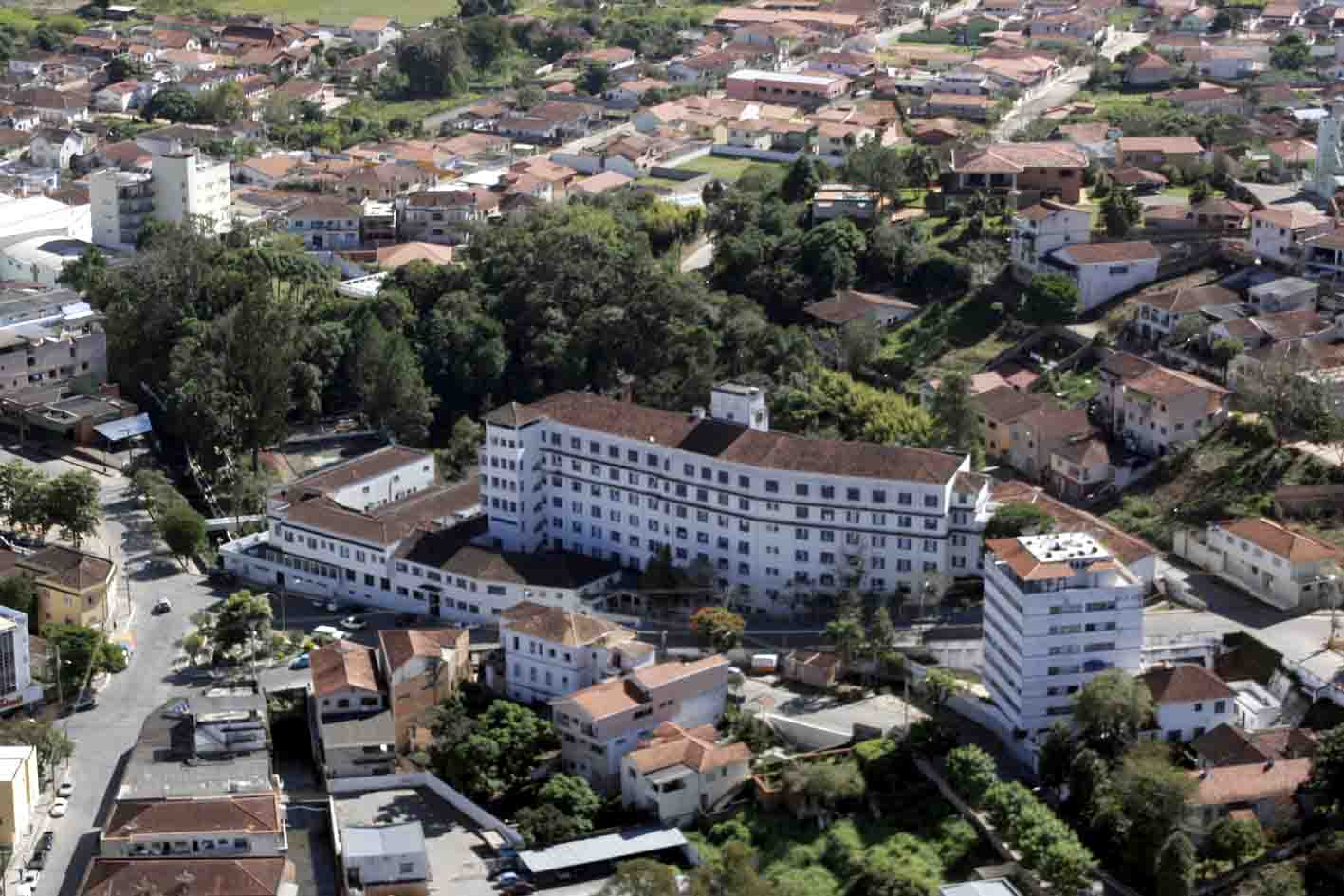 Aérea Lambari